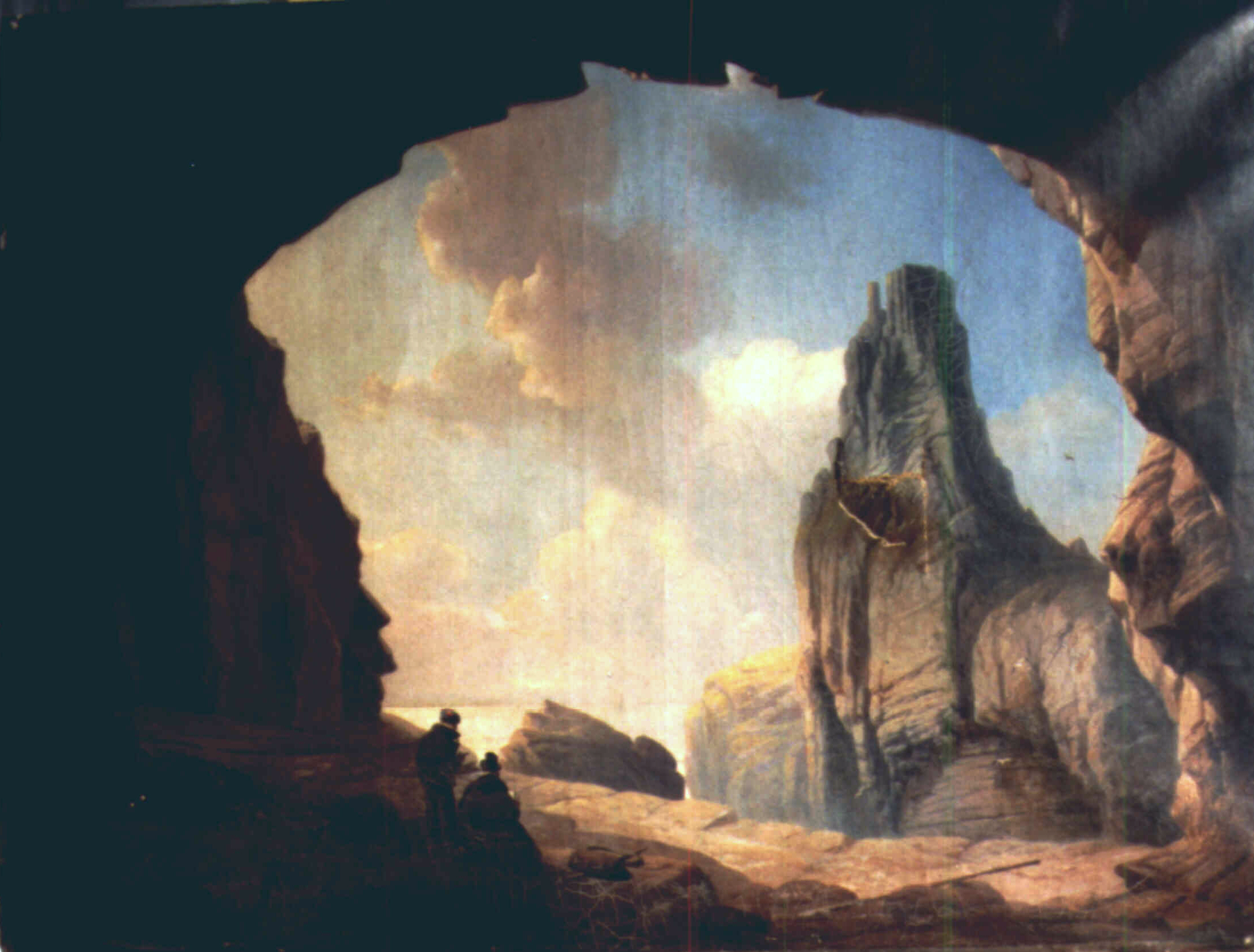 Gemälde von Wilhelm Krause, Privatbesitz